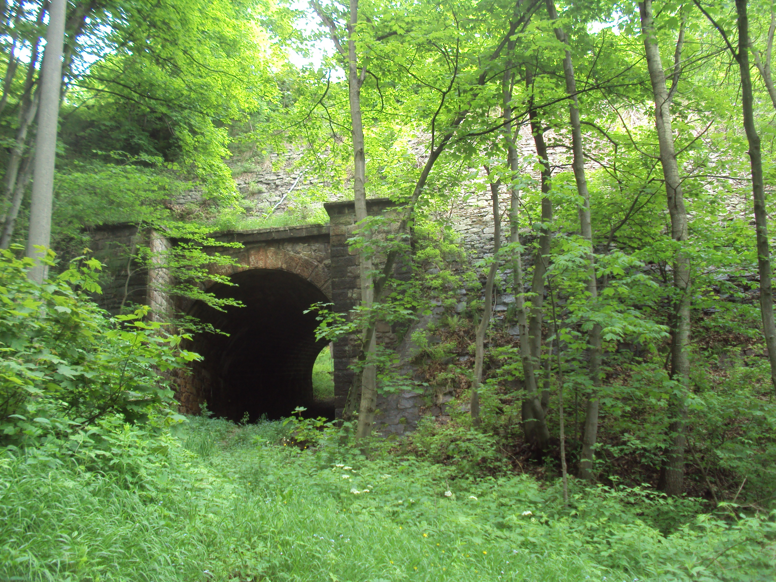 Železnice poblíž zastávky Mikulov v Krušných horách